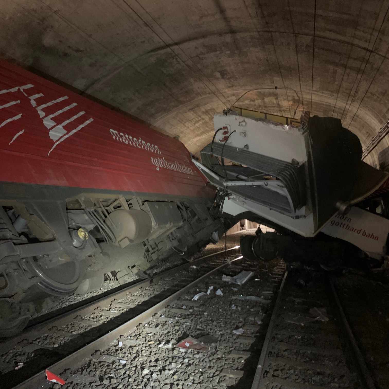 Kollision zweier Züge der Matterhorn-Gotthard-Bahn am 3. Juli 2020 bei Oberwald VS.